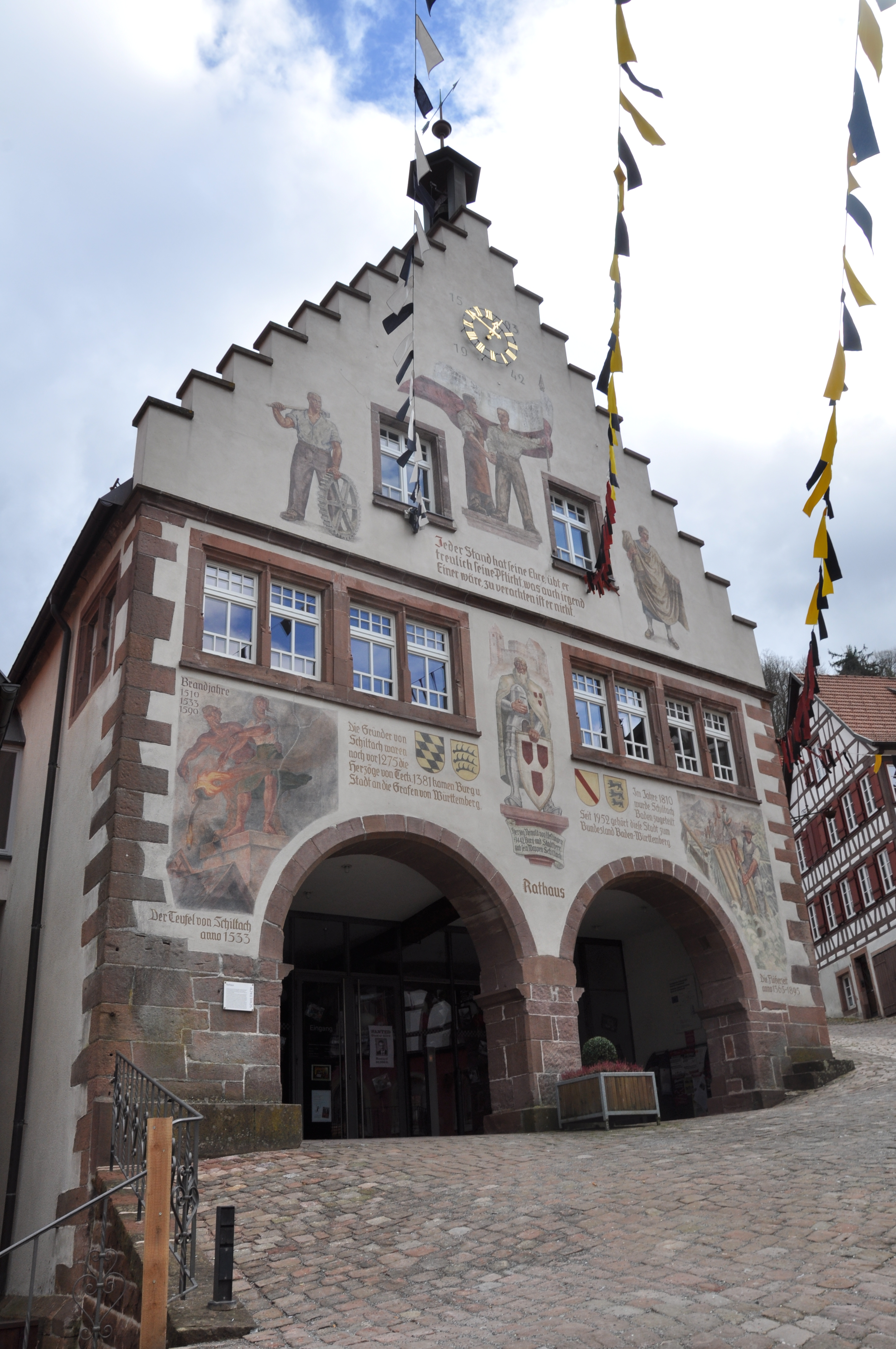 Schiltach, Rathaus, Fassade mit Bemalung von Eduard Trautwein, 1942